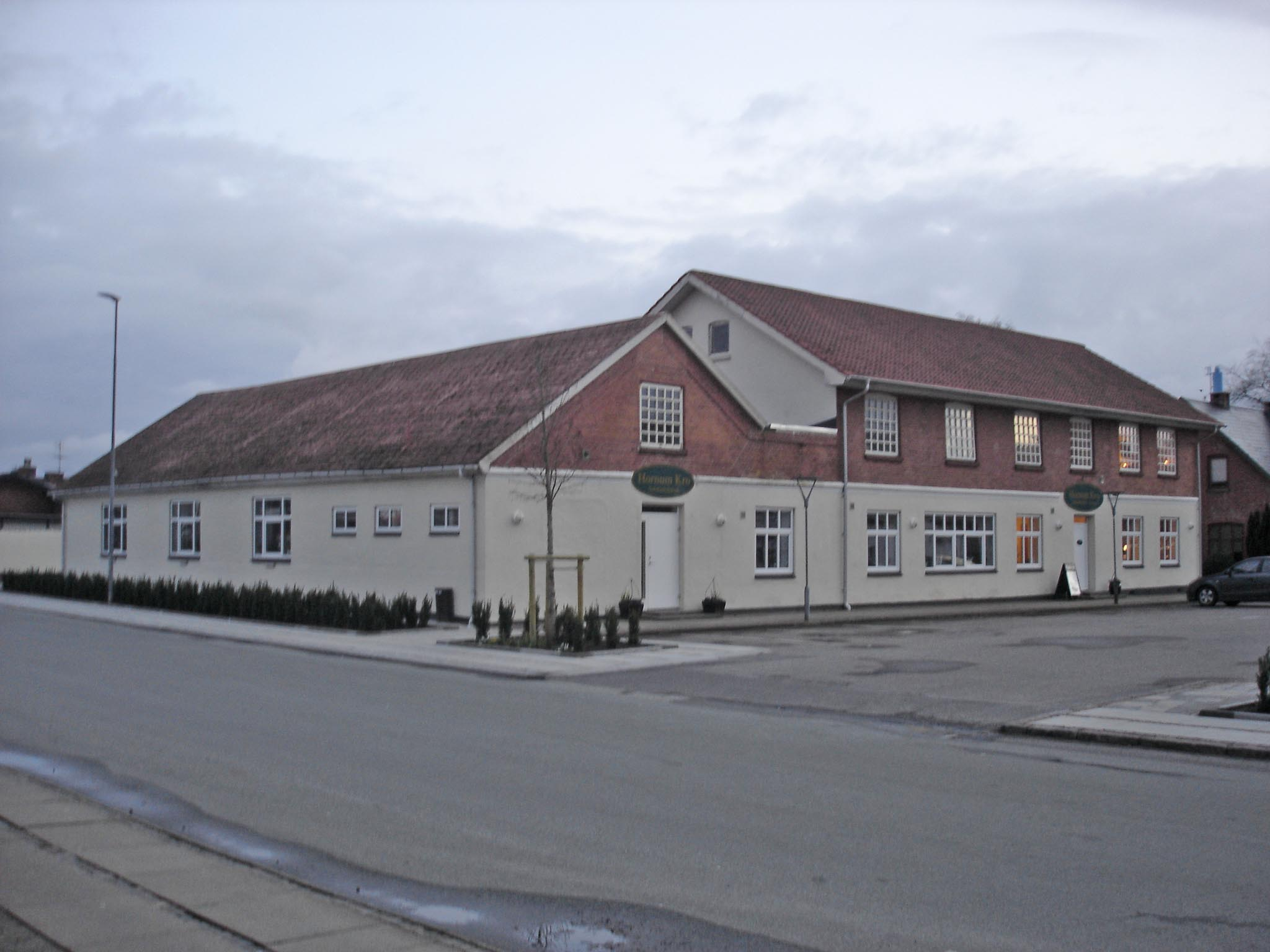 Hornum Kro